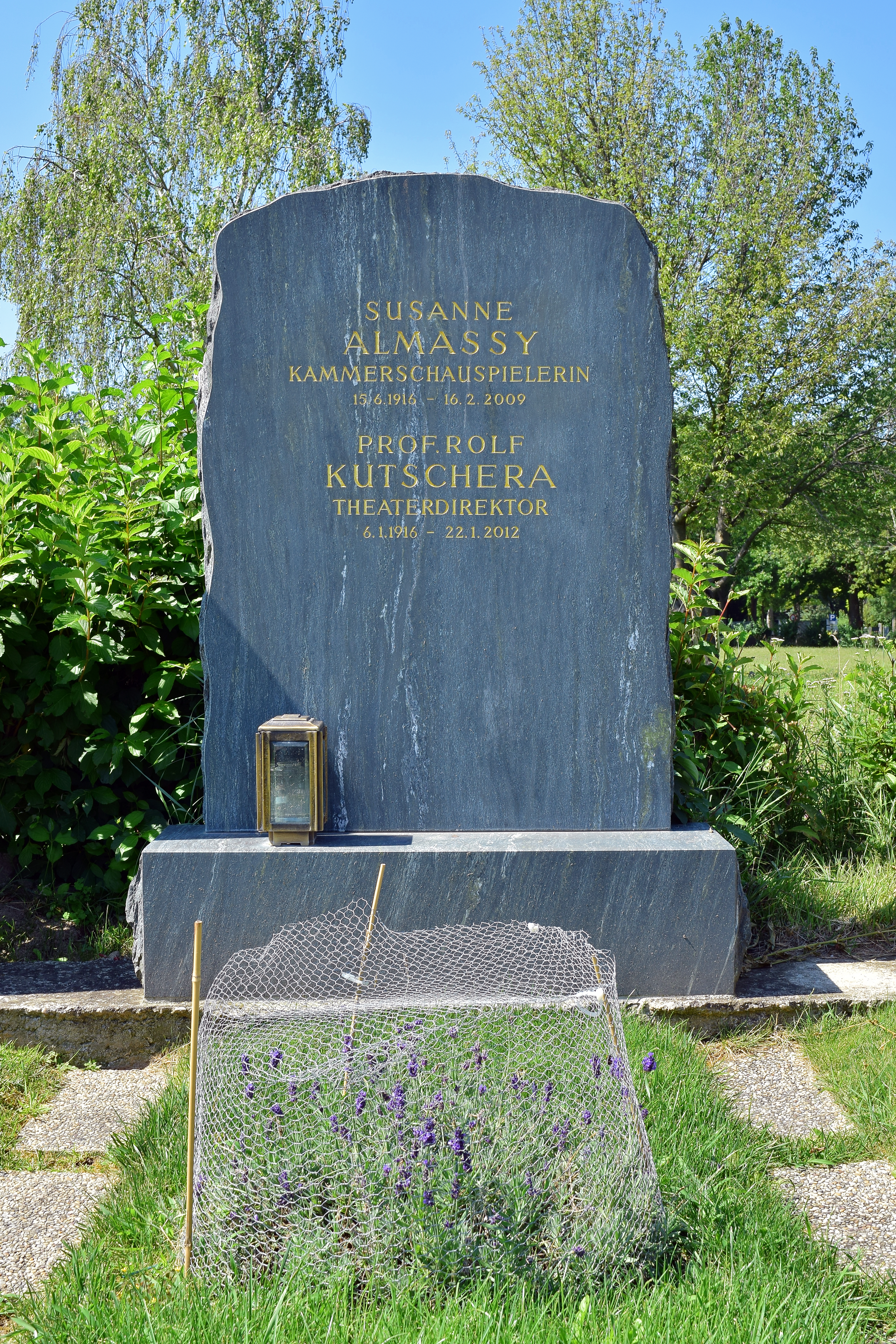 Ehrengrab von Susanne Almassy auf dem Wiener Zentralfriedhof, Gruppe 40, Nr. 77.